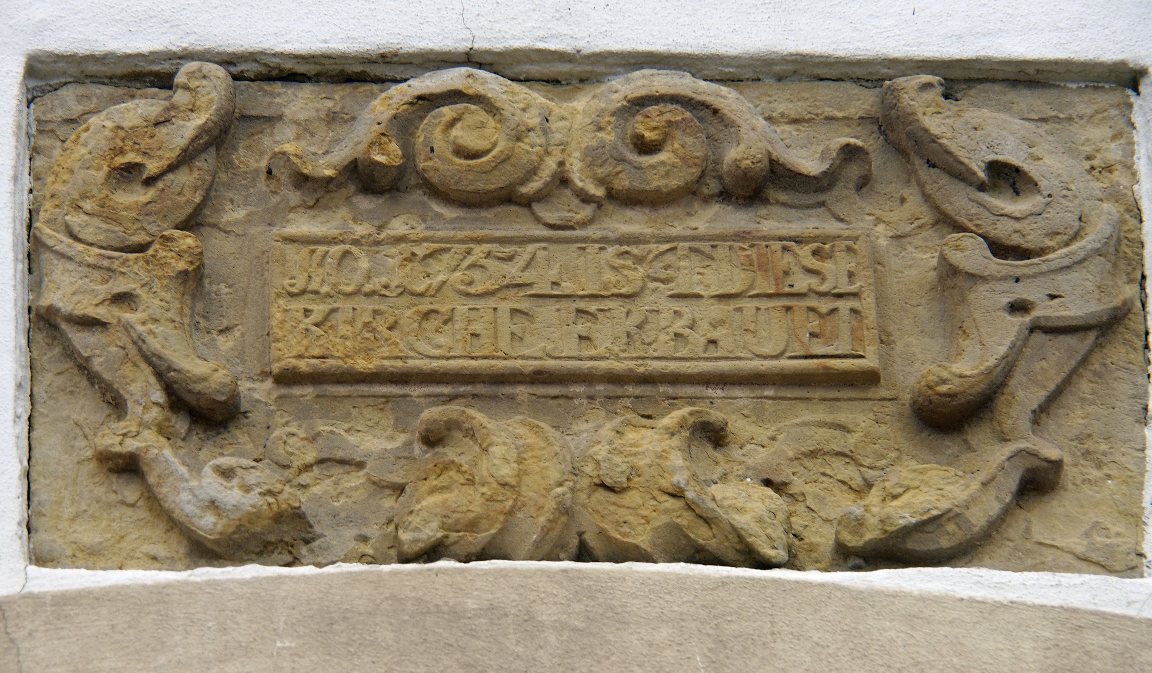 Türüberschrift an der Fabian-und-Sebastian-Kirche Sülze (Bergen): „Anno 1754 ist diese Kirche erbauet“